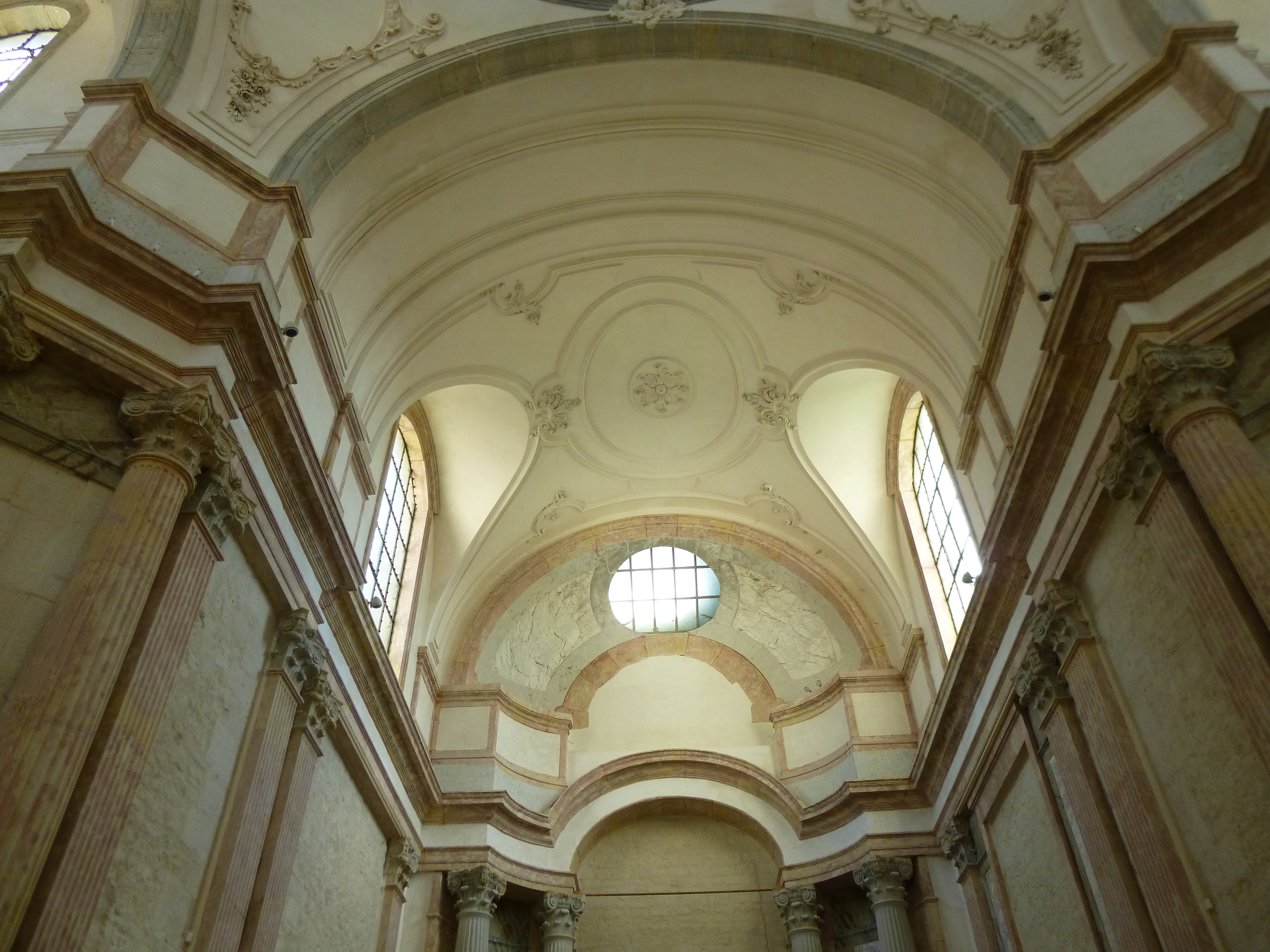 vue du chevet et du transept droit de l'abbaye Sainte-Odile à Baume-les-Dames